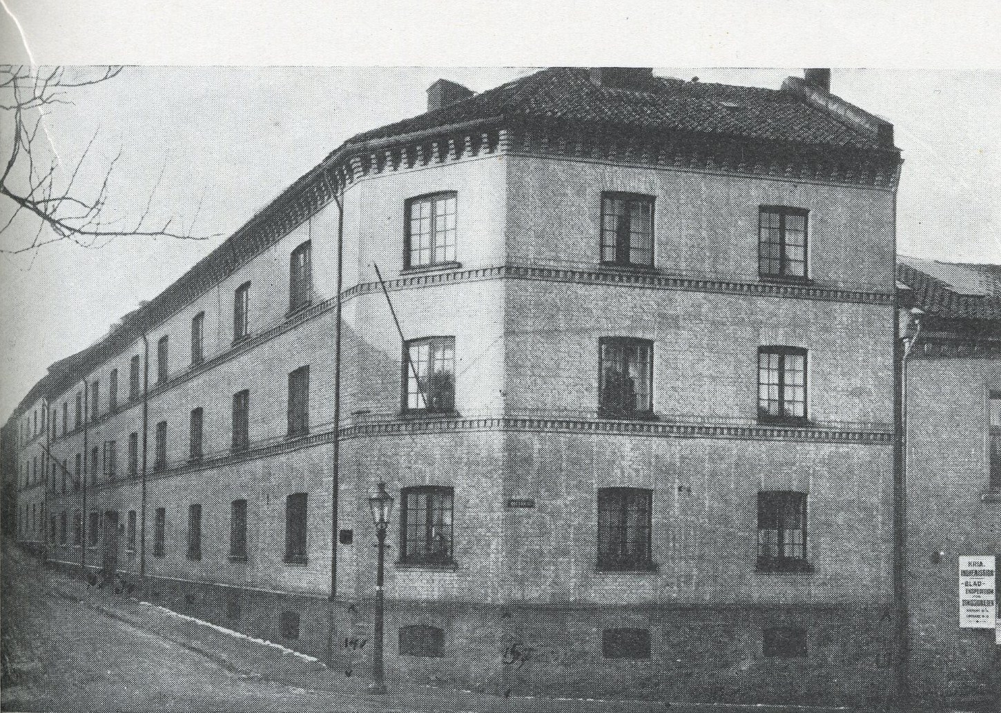 Philantropic housing project in Hammersborg neighbourhood, Oslo, 1851 Hammersborg arbeiderboliger, Nedre Hammersborggaten 11 (nåværende Hammersborg Torg), bygget 1851 av et boligselskap for arbeiderboliger, startet av politimester og kammerherre Chr. von Munthe af Morgenstierne, arkitekt Holtermann. Bygningen inneholdt 6 leiligheter med to rom og kjøkken og 36 med ett rom og kjøkken. I egen bygning i gårdsrommet fantes bryggerhus, tørkeloft og baderom. Revet 1962